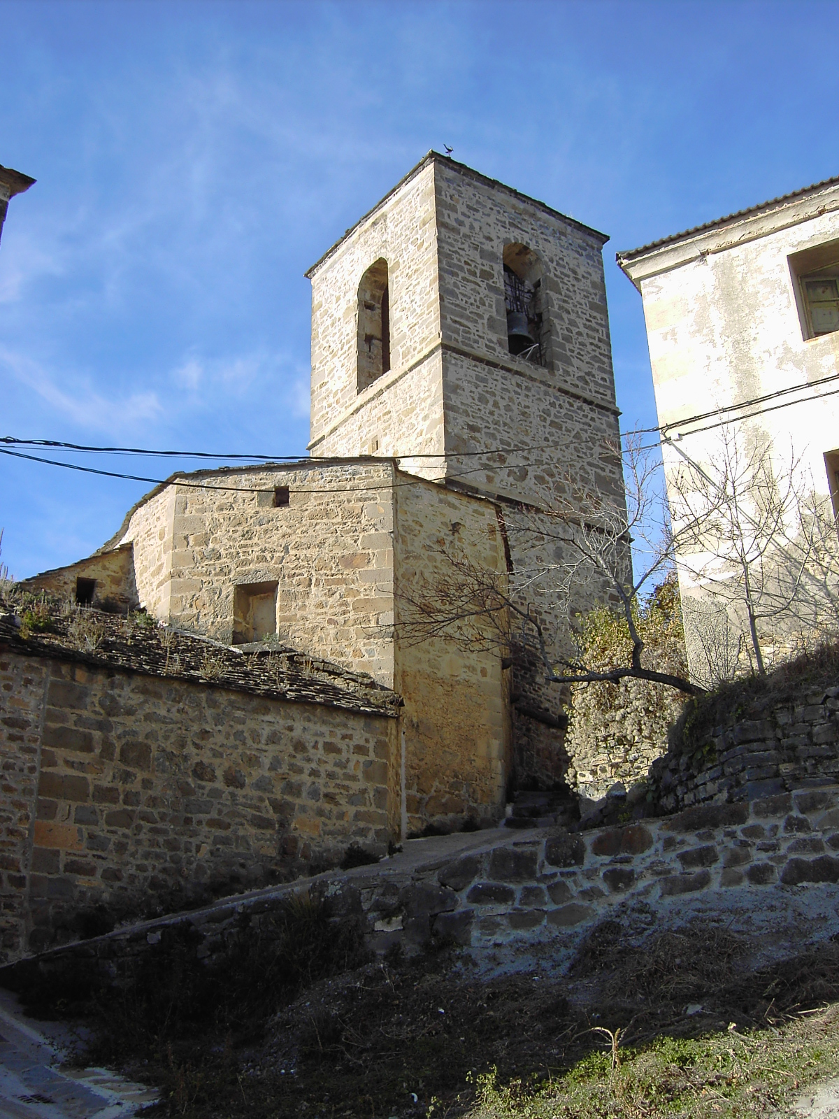 Iglesia románica de Puértolas (siglo XII), en el pequeño núcleo del municipio homónimo, que aunque da nombre al municipio ya no ostenta su ayuntamiento. Se encuentra en la comarca del Sobrarbe, Provincia de Huesca, norte de España.